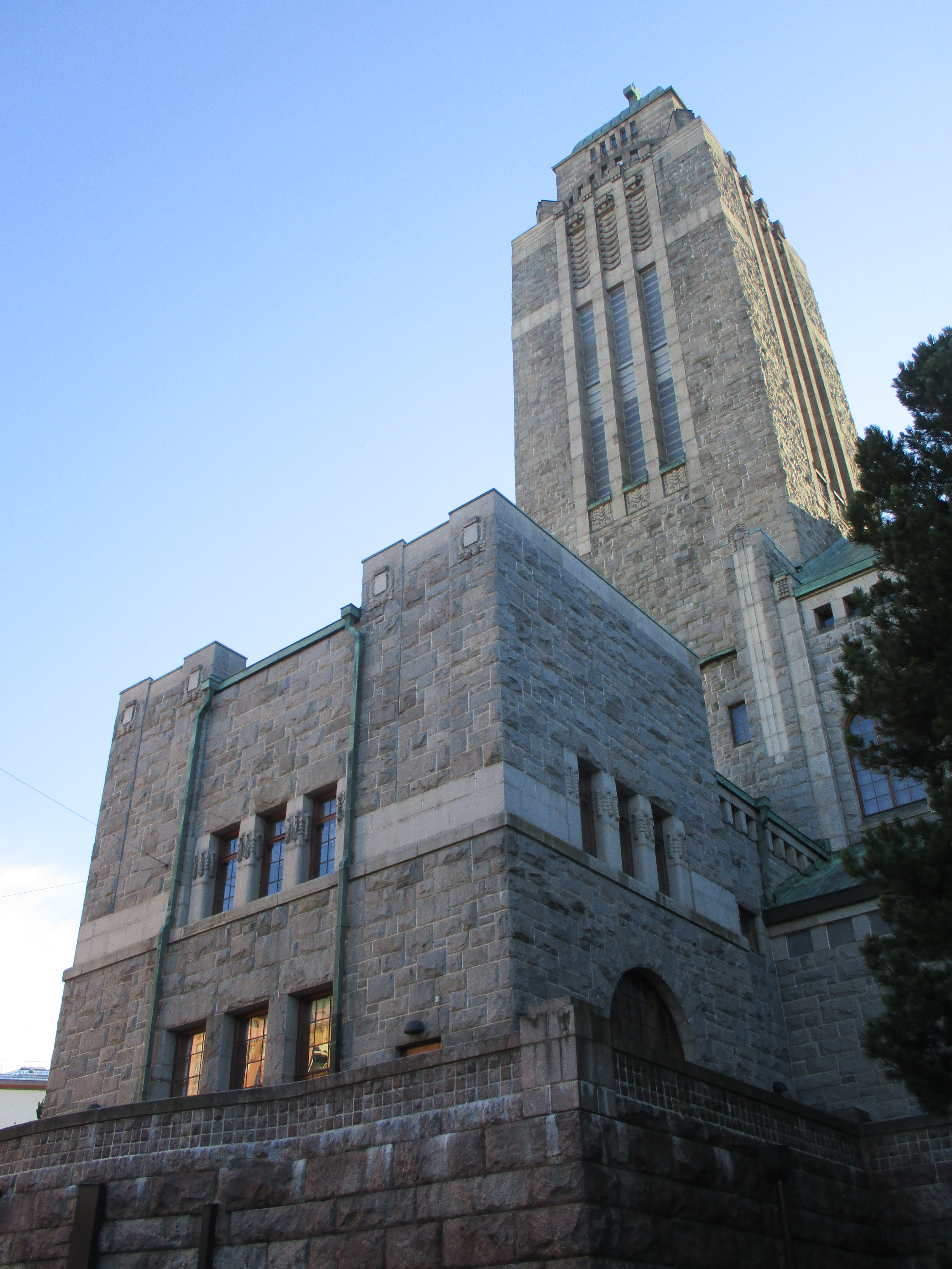 Kallion kirkko